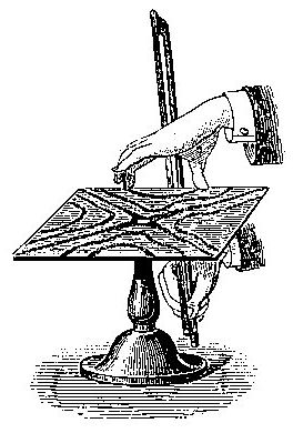 Création des figures de Chladni